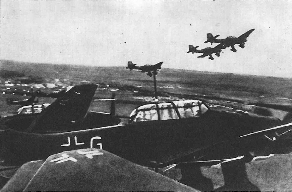 Niemieckie bombowce Junkers Ju 87 po starcie z lotniska w Słupsku.